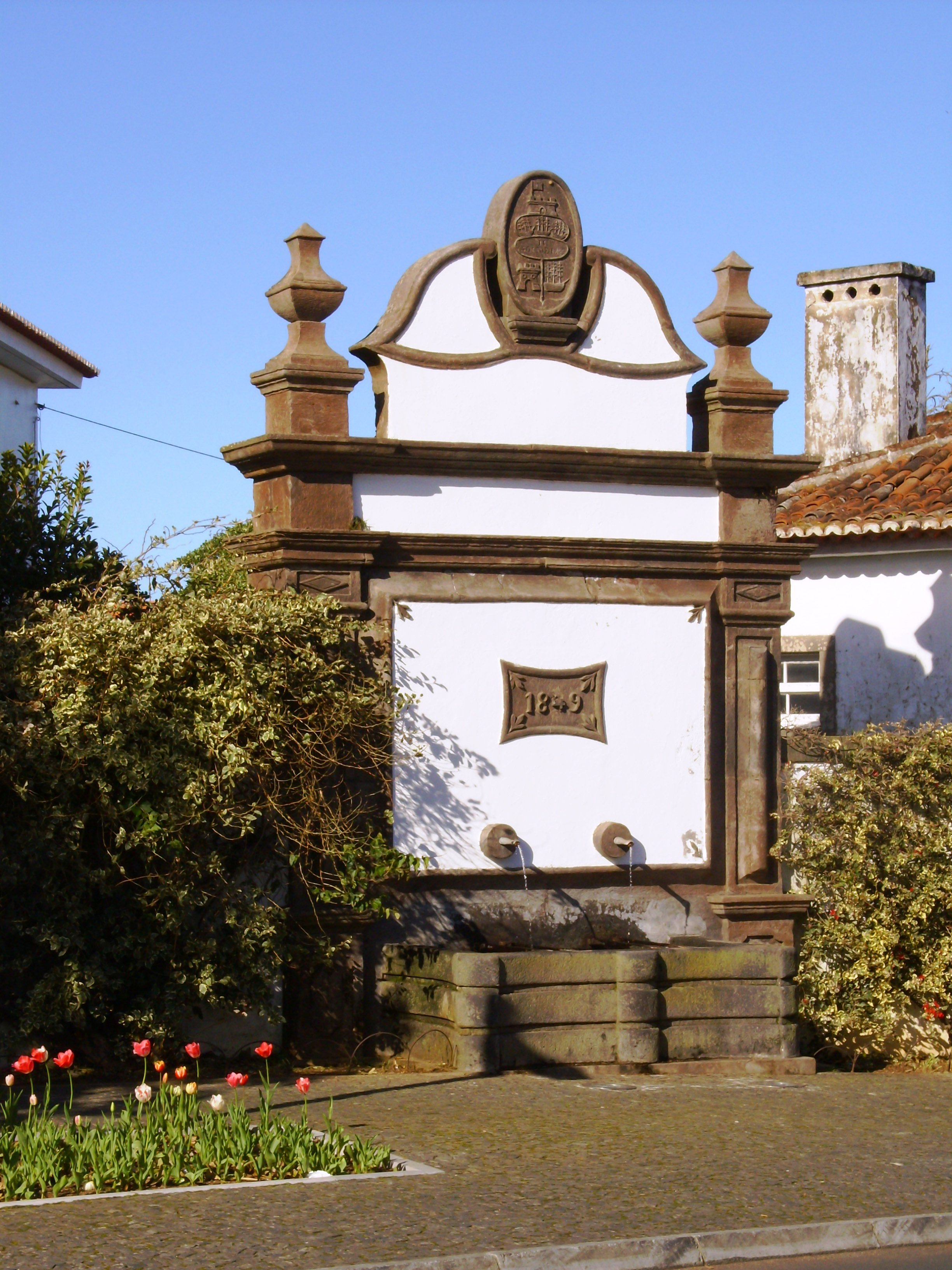 Fontanário no largo do Conde da Praia da Vitória, freguesia de Santa Cruz, concelho da Praia da Vitória, ilha Terceira, Açores.